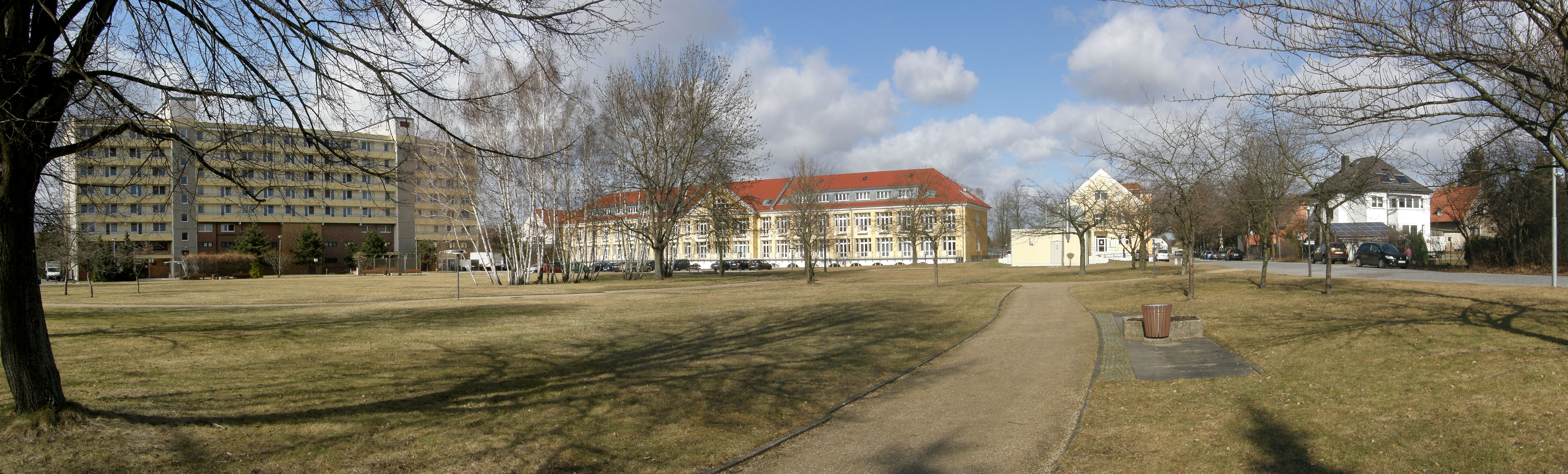 Straße Alt-Kaulsdorf, Panoramablick auf das Gelände und die Gebäude des Krankenhauses Kaulsdorf